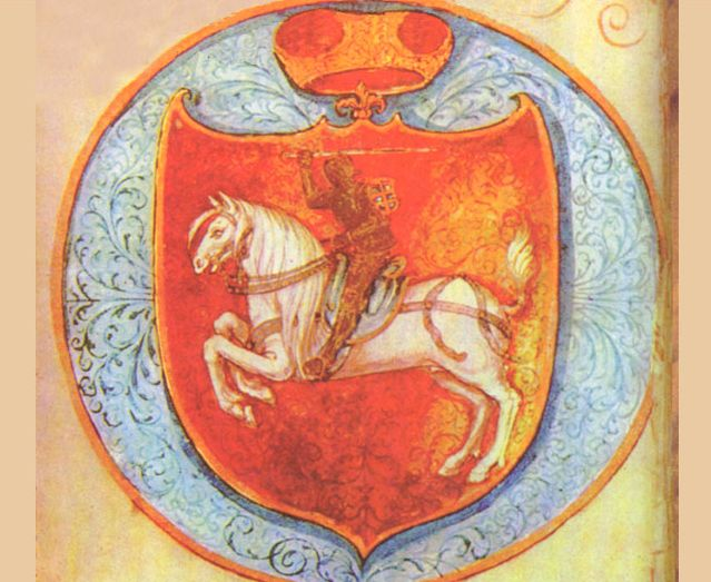 Беларуская (тарашкевіца): Герб Пагоня з Лаўрэнцьеўскага сьпісу Статуту Вялікага Княства Літоўскага